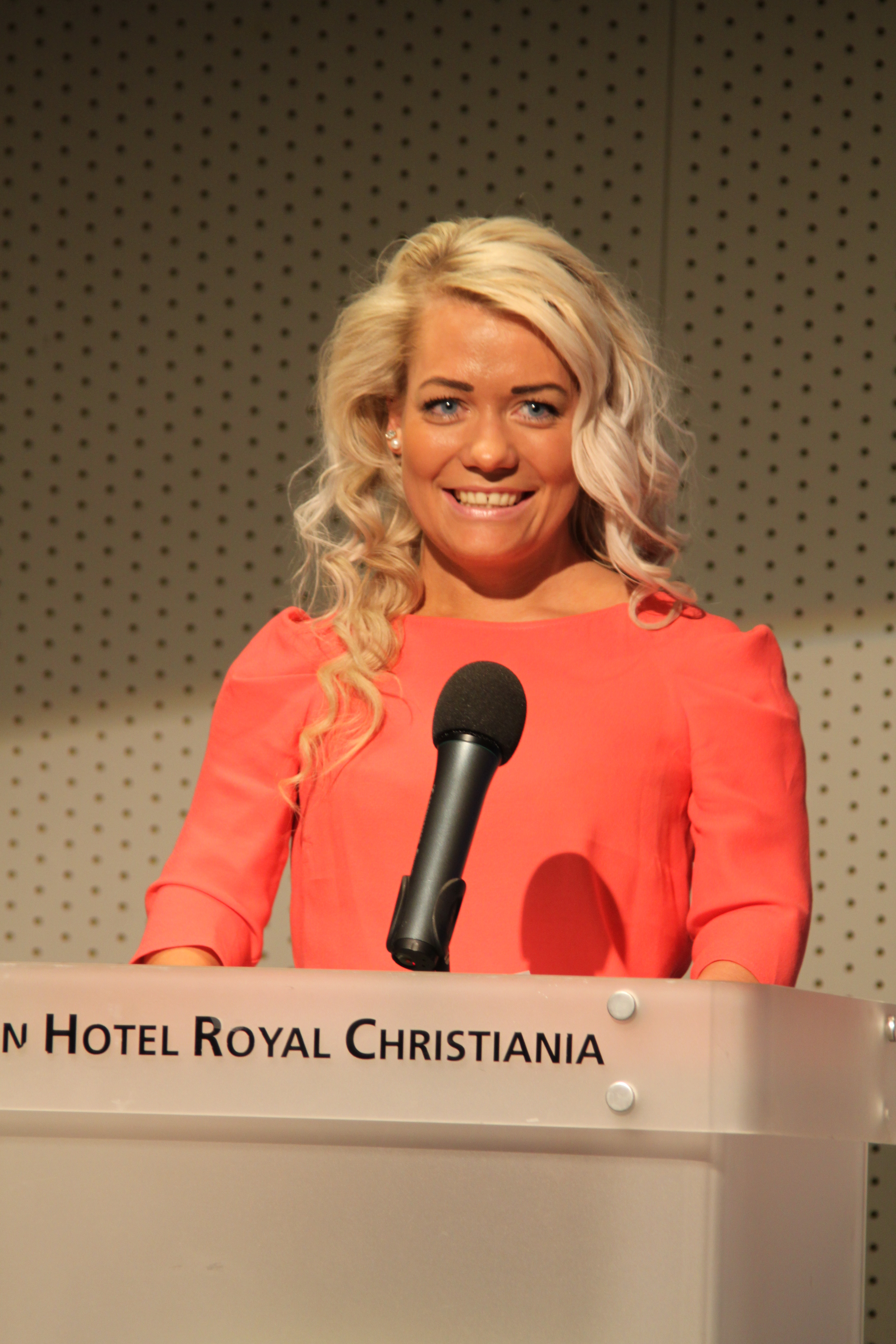 Sandra Borch holder hilsningstale på FpUs landsmøte 2012